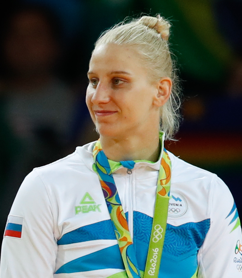 Rio de Janeiro - A judoca brasileira Mayra Aguiar vence cubana na categoria até 78 quilos e ganha medalha de bronze na Rio 2016 (Fernando Frazão/Agência Brasil)